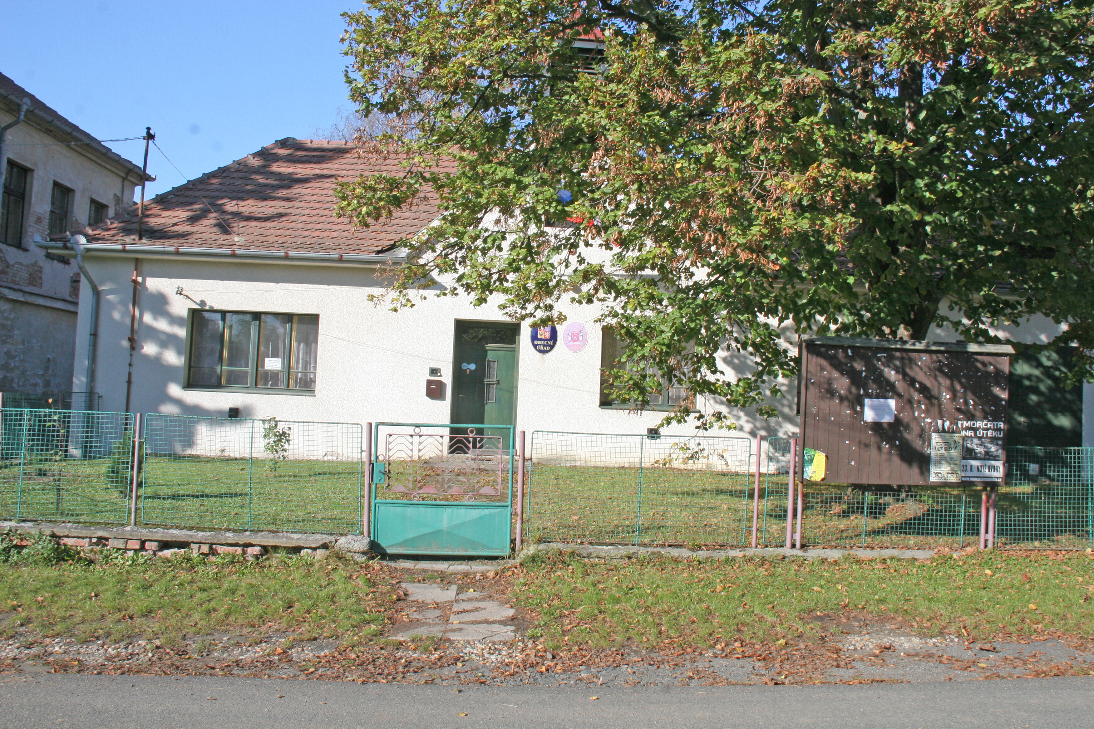 Vinaře obecní úřad